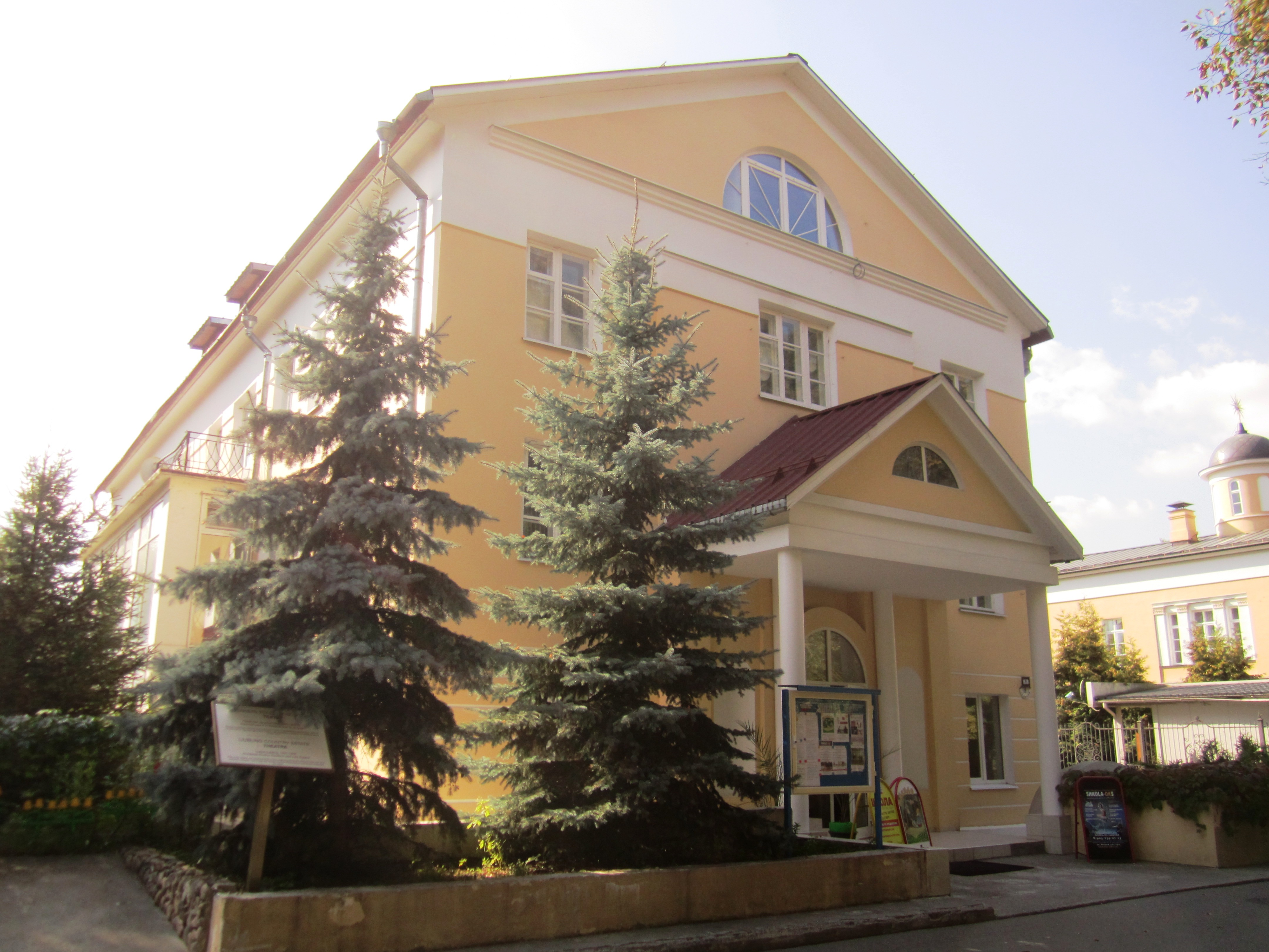 Флигель западный: Ейская ул., 6, Люблино, Юго-Восточный округ, Москва